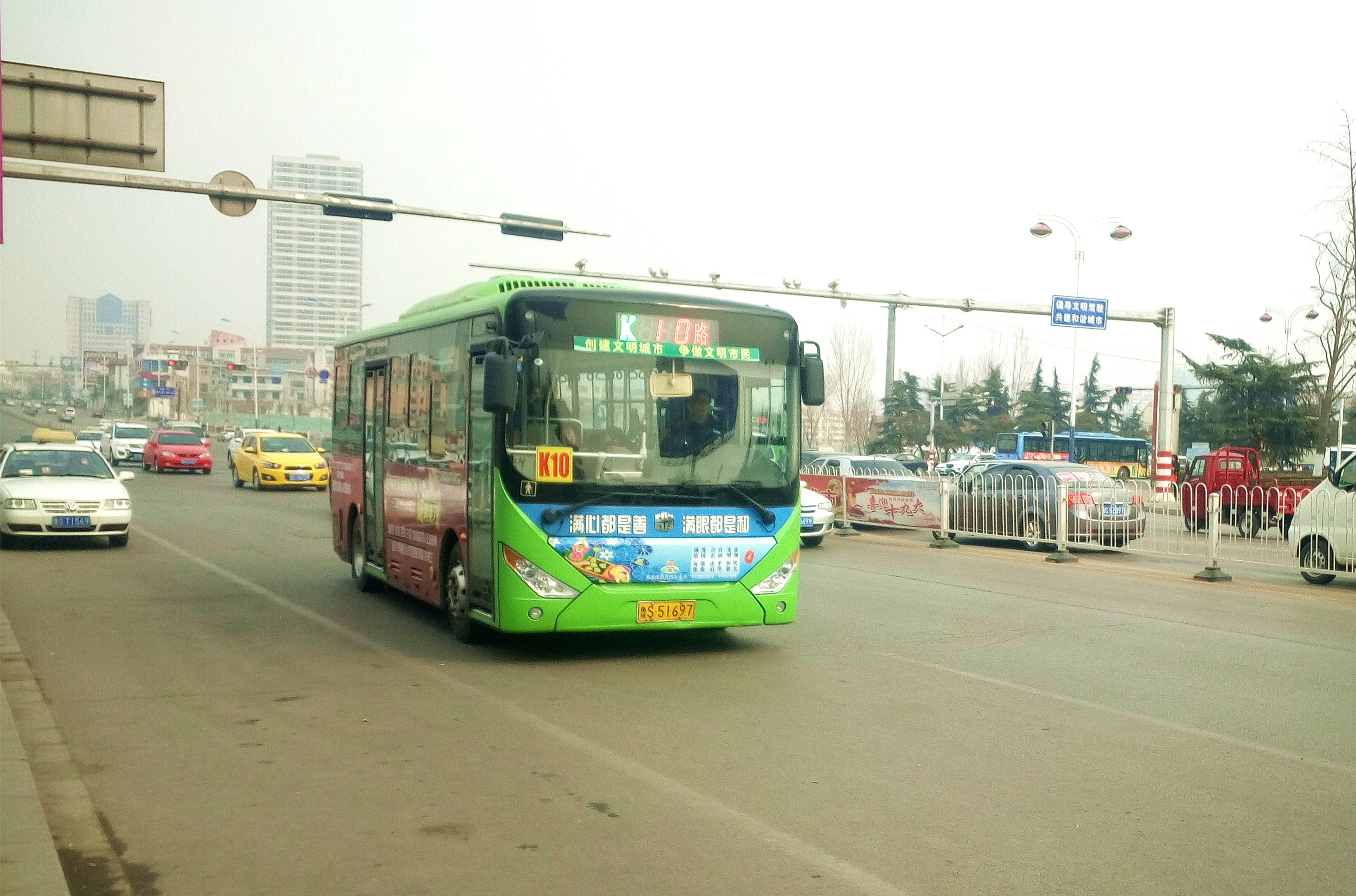 在大桥路上行驶的莱芜公交k10路